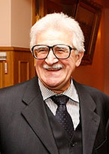 Нодари Александрович Симония (род. 30 января 1932, Тифлис, Грузинская ССР) — российский политолог, учёный-востоковед.